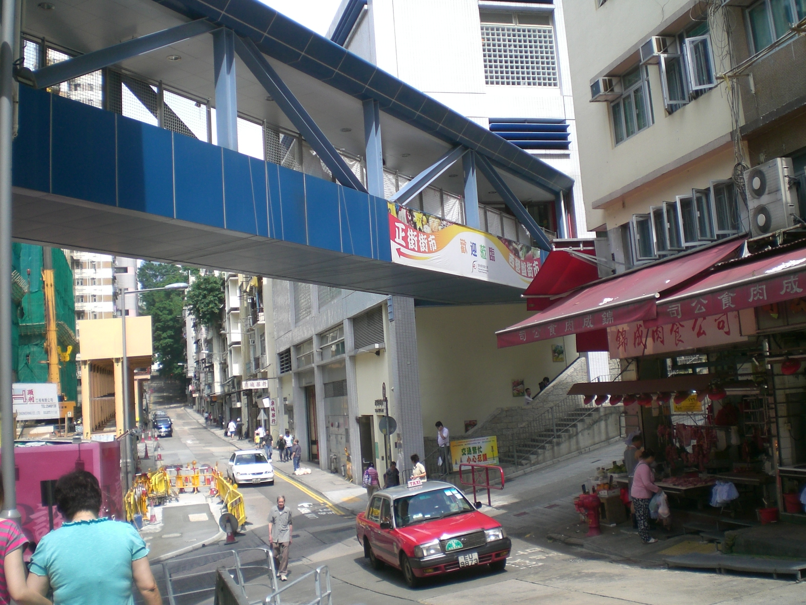 第二街行人天橋至西營盤街市